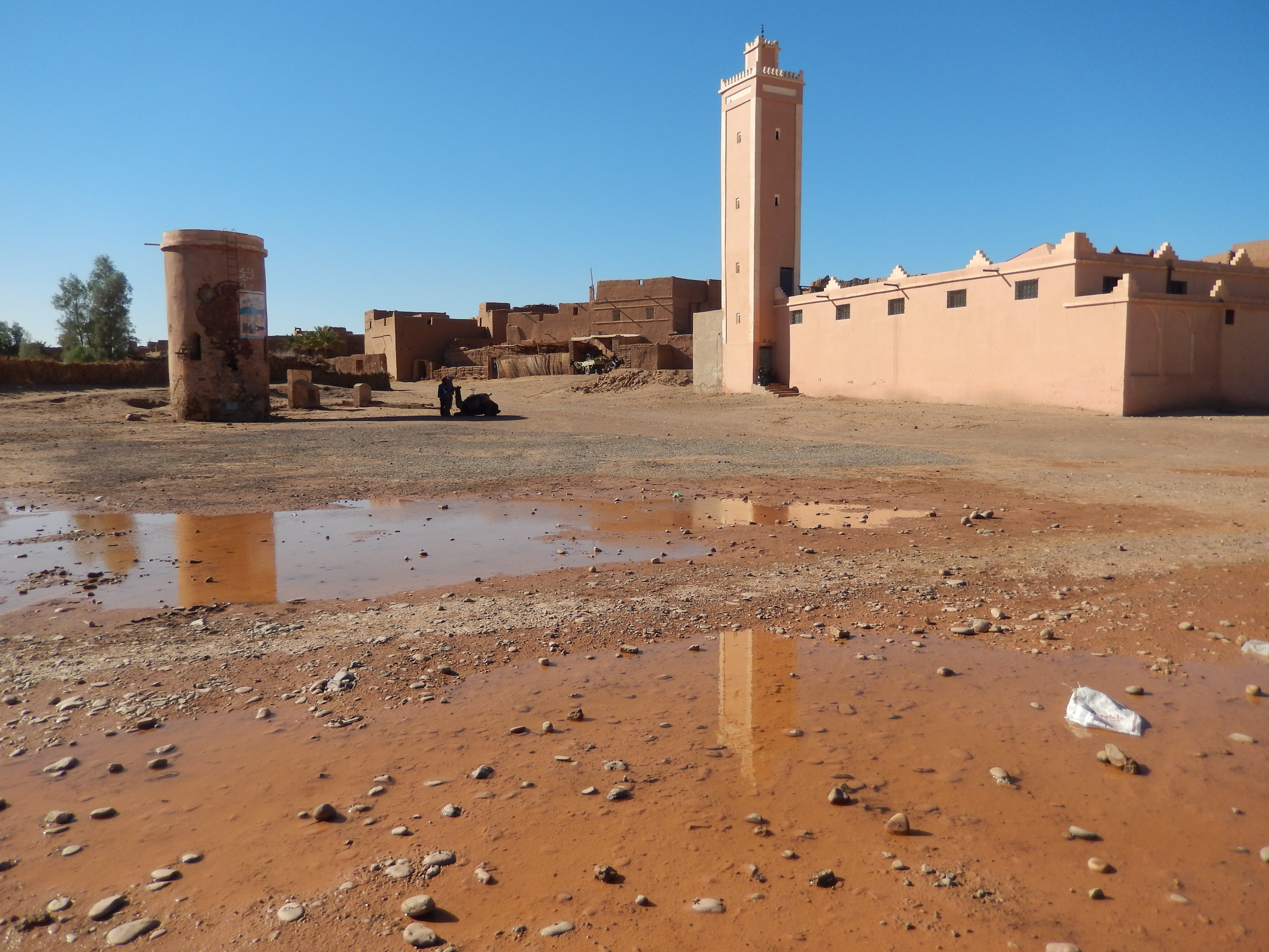 Alter Teil von Mhamid mit neuer Moschee